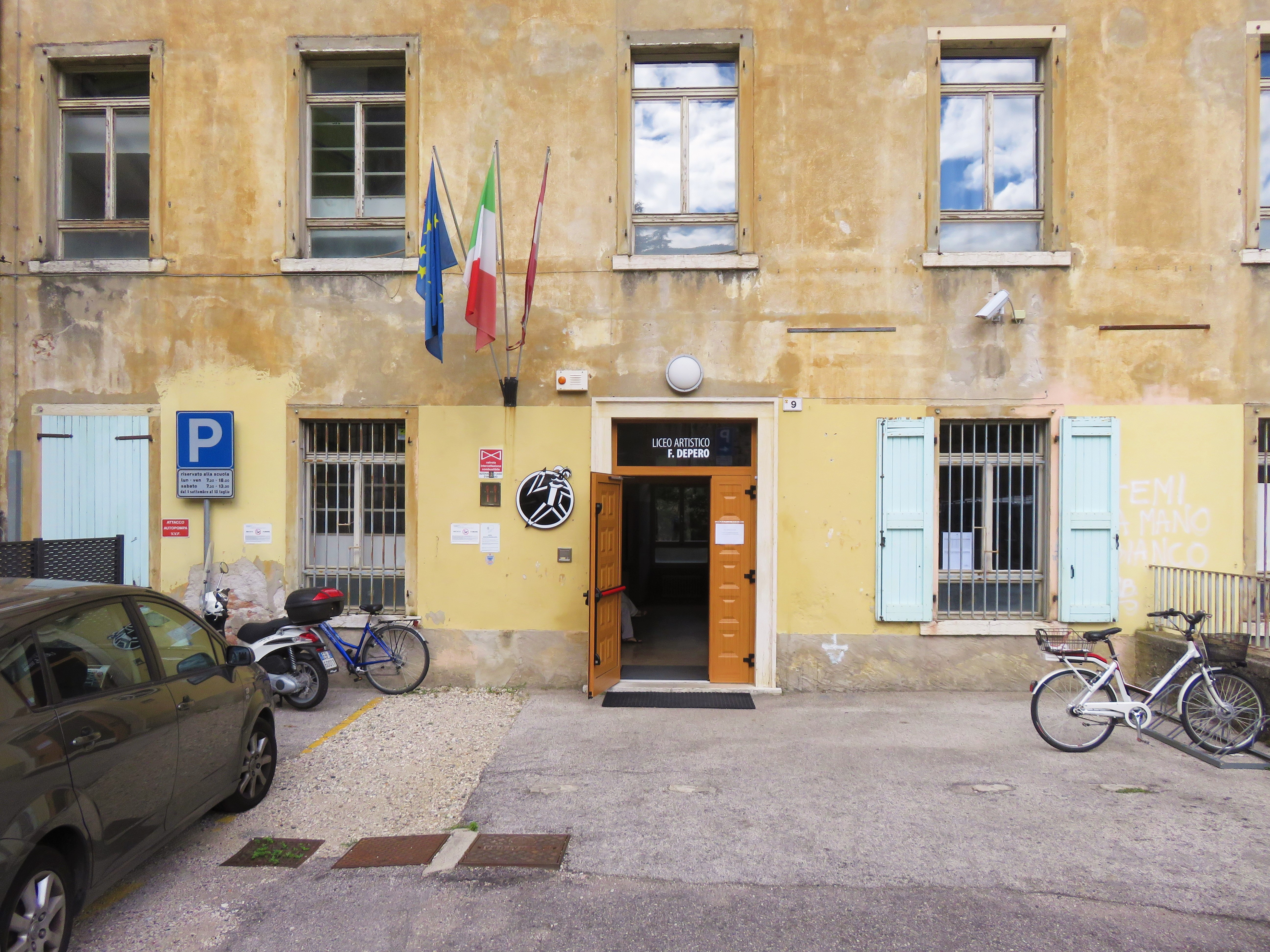 Liceo artistico Depero – Rovereto Via delle Fosse.